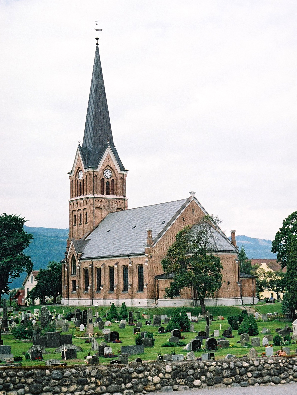 Lillehammer church, Norway. Architect: Henrik Thrap-Meyer.